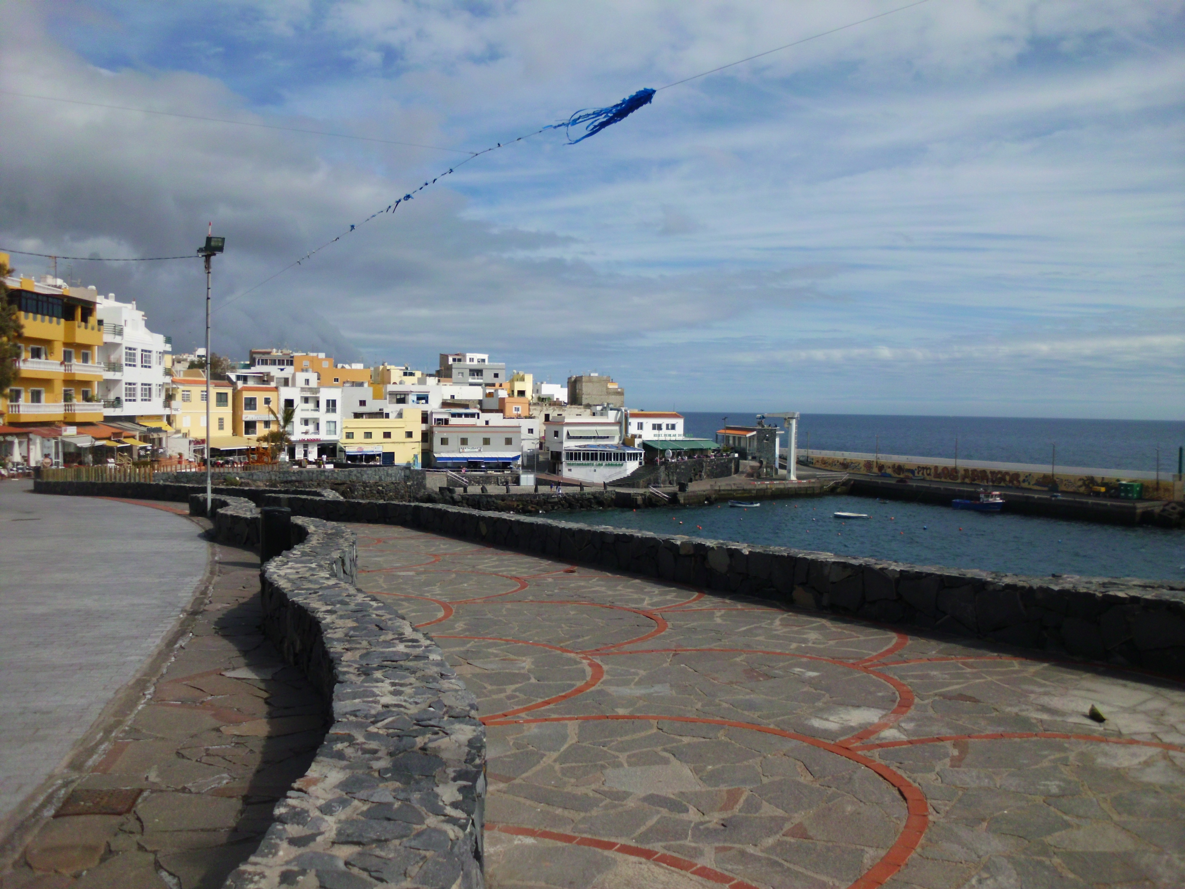 Vista de Los Abrigos (Granadilla de Abona)